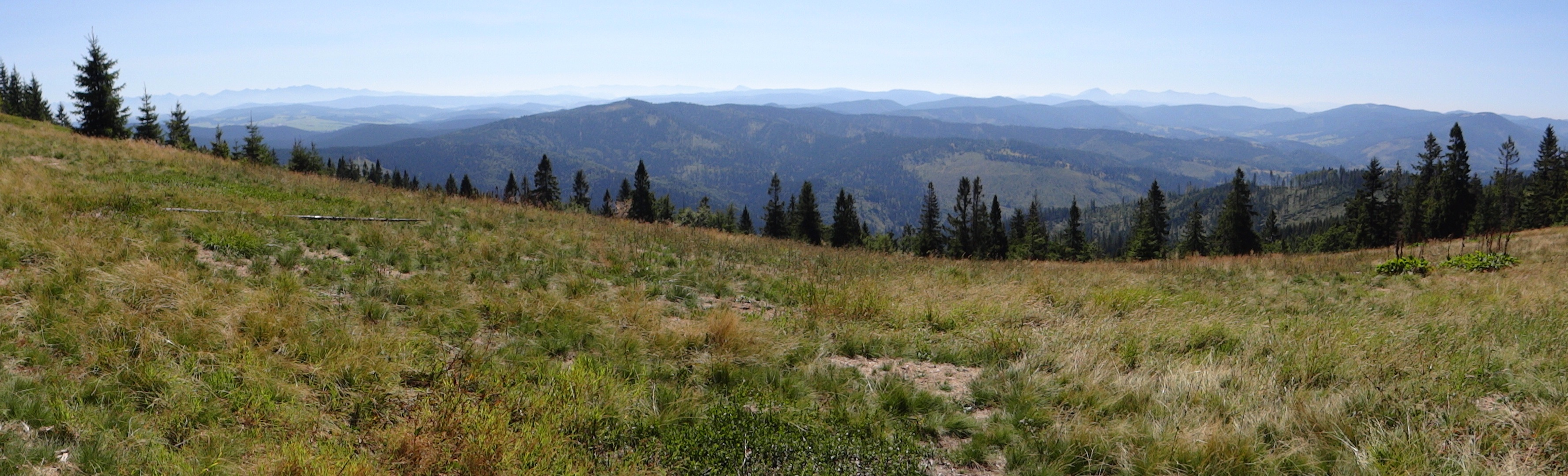 Hala Bieguńska i panorama widokowa